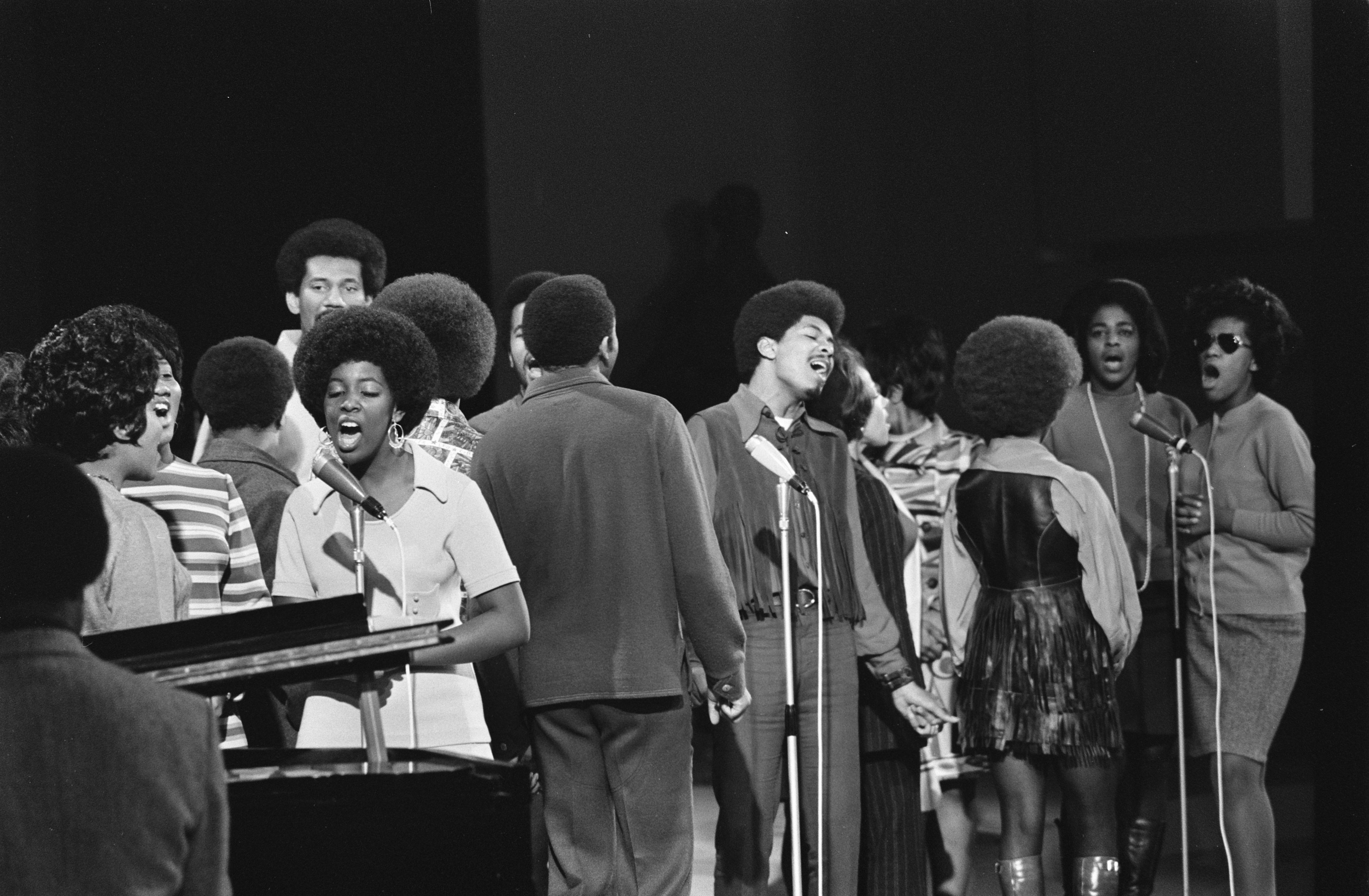 Collectie / Archief : Fotocollectie Anefo Reportage / Serie : [ onbekend ] Beschrijving : Grand Gala du Disque in RAI Amsterdam. Repetities. Edwin Hawkins Singers Datum : 26 februari 1970 Locatie : Amsterdam, Noord-Holland Trefwoorden : REPETITIES Persoonsnaam : Edwin Hawkins Singers Fotograaf : Mieremet, Rob / Anefo Auteursrechthebbende : Nationaal Archief Materiaalsoort : Negatief (zwart/wit) Nummer archiefinventaris : bekijk toegang 2.24.01.05 Bestanddeelnummer : 923-2983